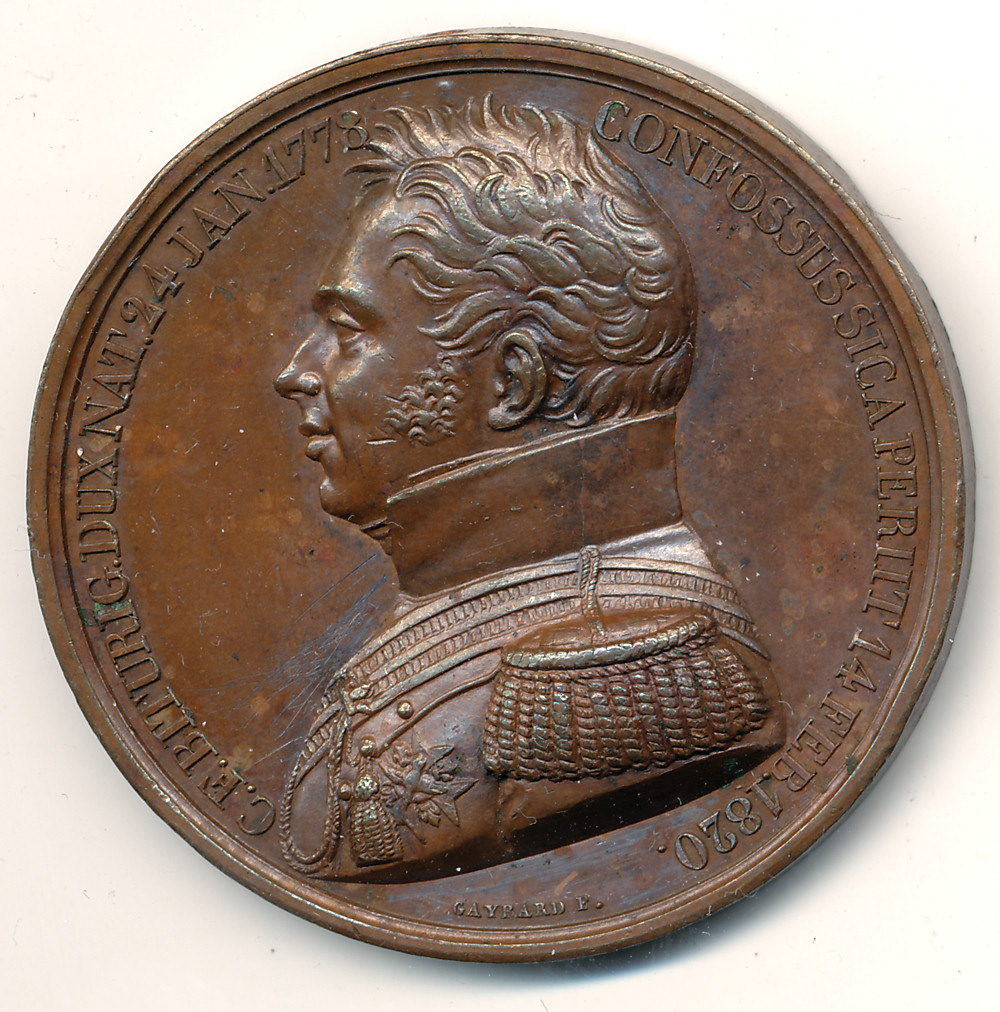 Le Duc de Berry, médaille bronze 41mm, signée Gayrard, 1820